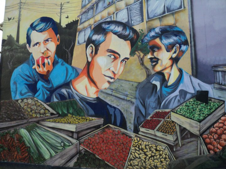 Grabado mural de la banda chilena Los Prisioneros de el Museo abierto a cielo en Avenida Departamental pasado Gran Avenida, San Miguel, Santiago de Chile.